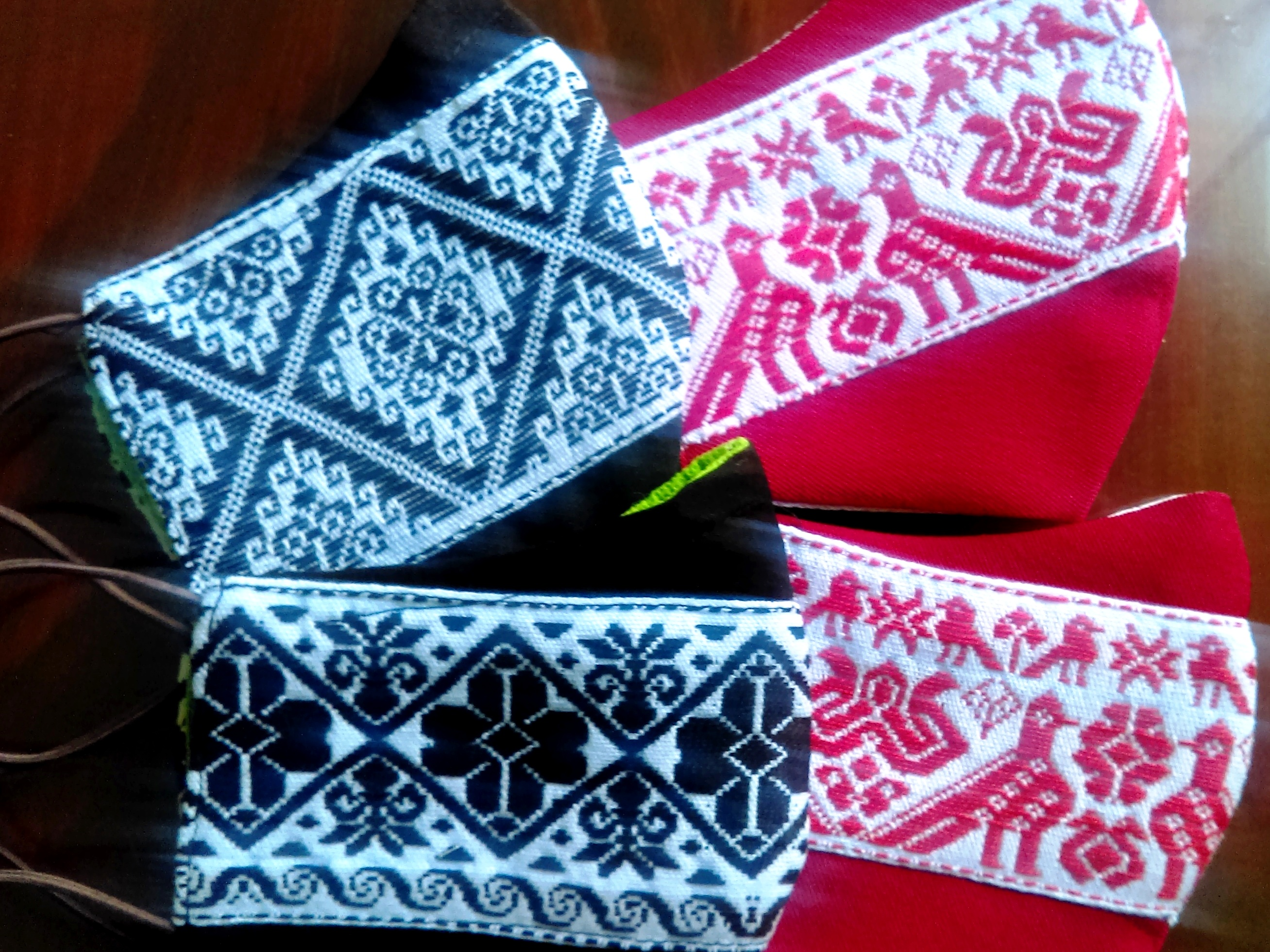 Cubrebocas con bordados otomíes de Ixmiquilpan.